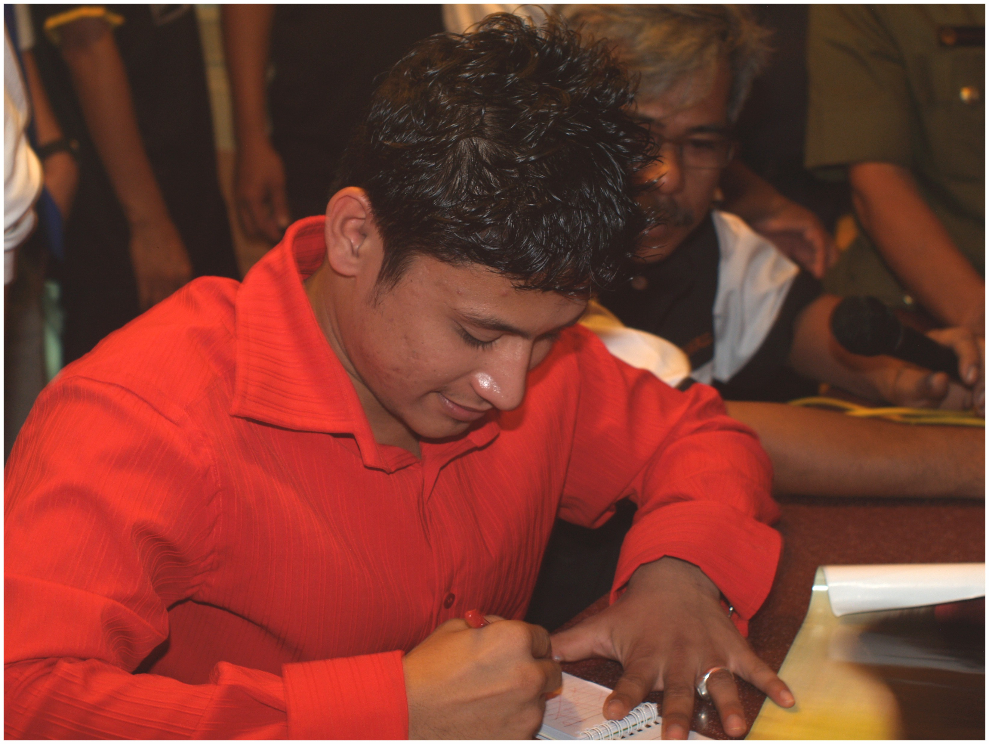 Autograph session at Kemaman, Terengganu